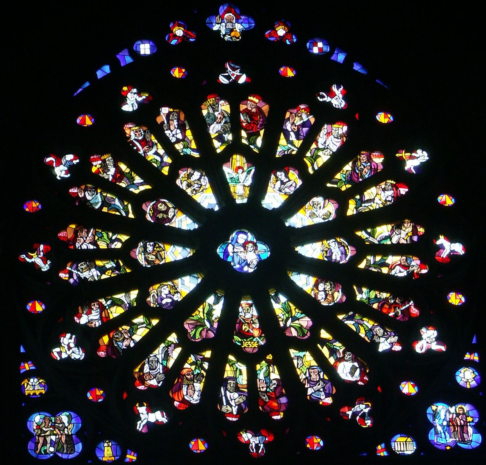 Détail de la rosace Basilique Notre Dame La Chapelle-Montligeon